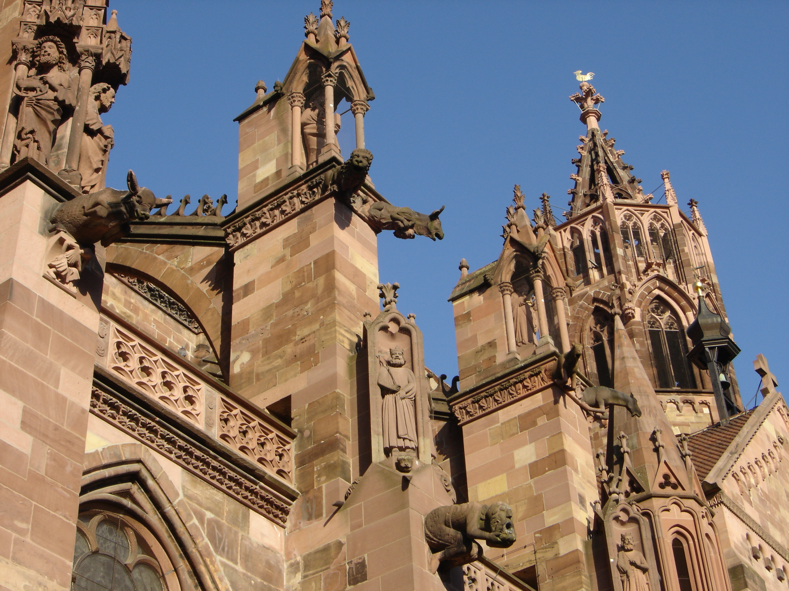 Freiburger Münster